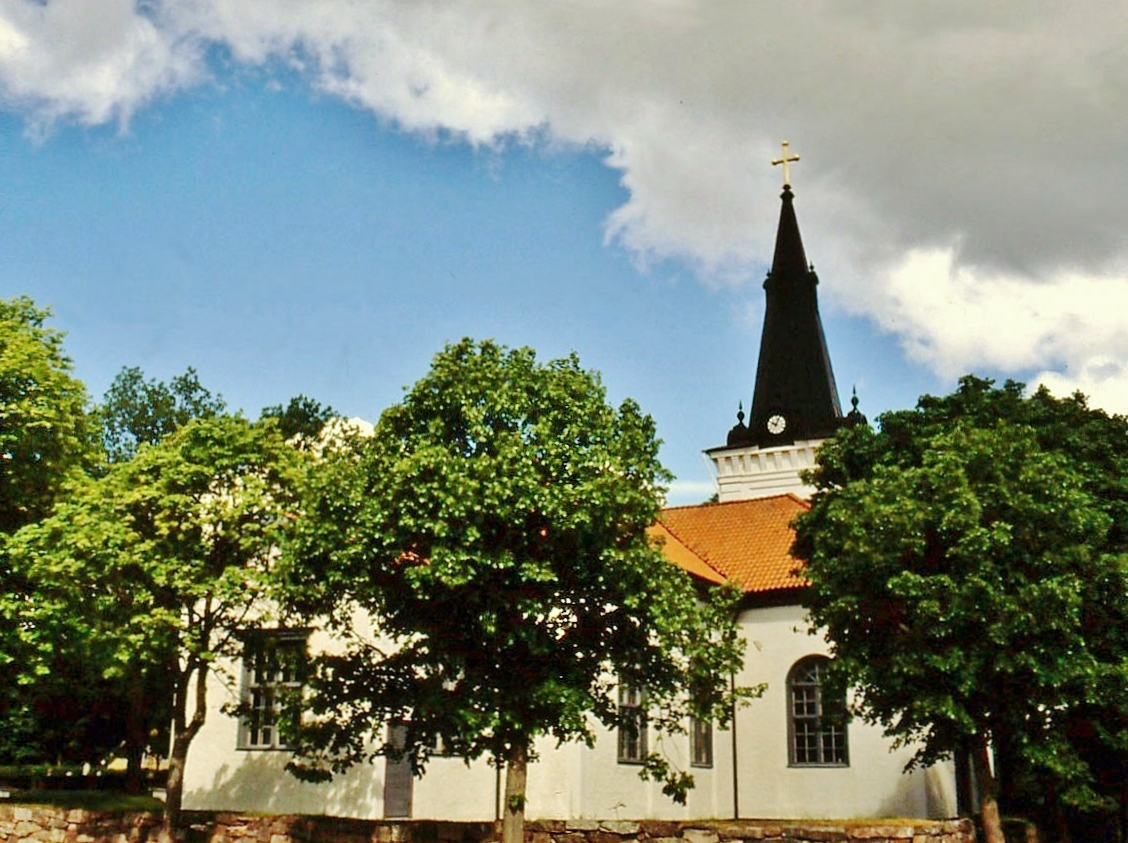 Fliseryds kyrka.